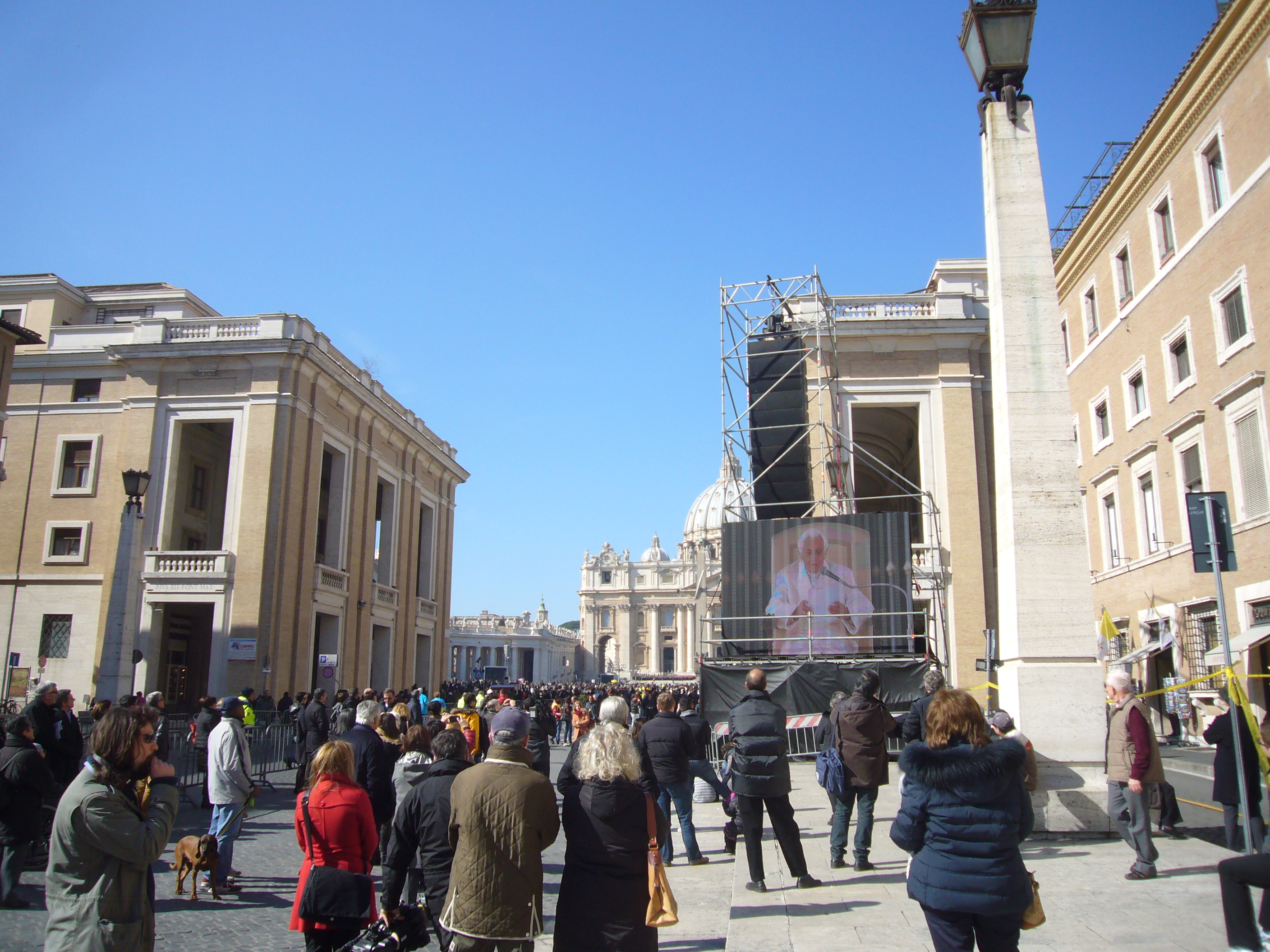 Roma, via della Conciliazione 27 febbraio 2013. Ultimo megaschermo di Benedetto XVI che annuncia le proprie dimissioni all'udienza generale del mercoledì.